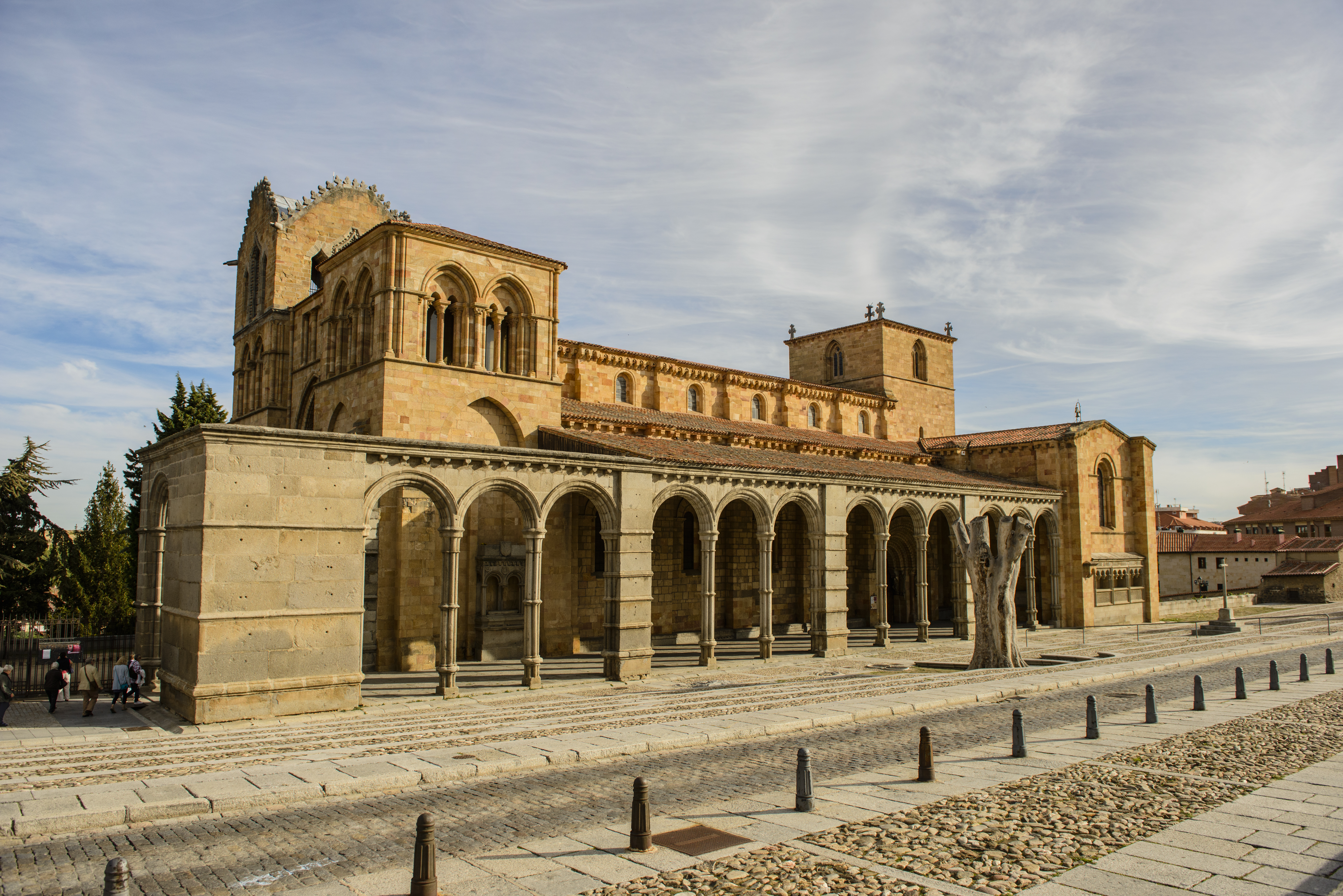 Basílica de San Vicente, Ávila, provincia de Ávila, Castilla y León, España.